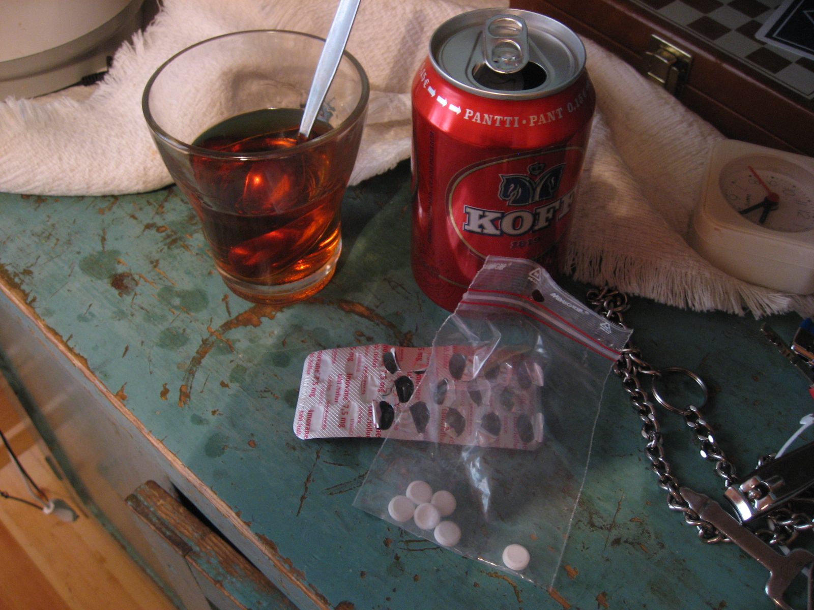 Sekakäyttö: alkoholia ja PKV-lääkkeitä